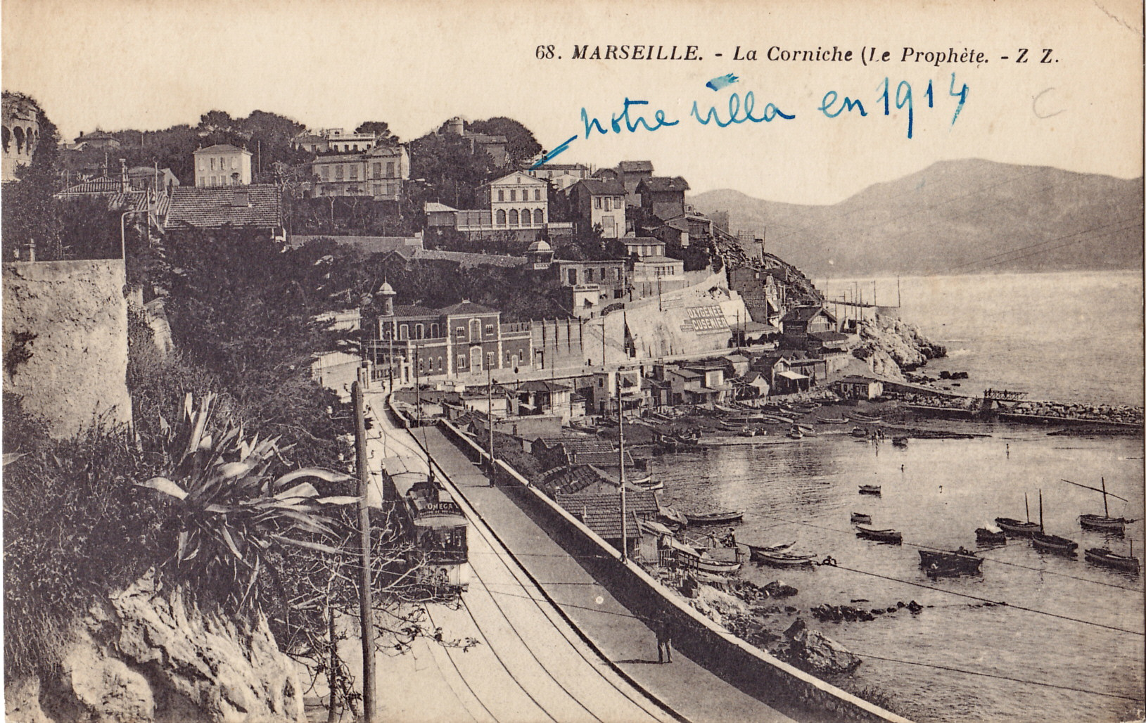 Carte postale ancienne éditée par ZZ, n°68 :MARSEILLE - La Corniche (Le Prophète)